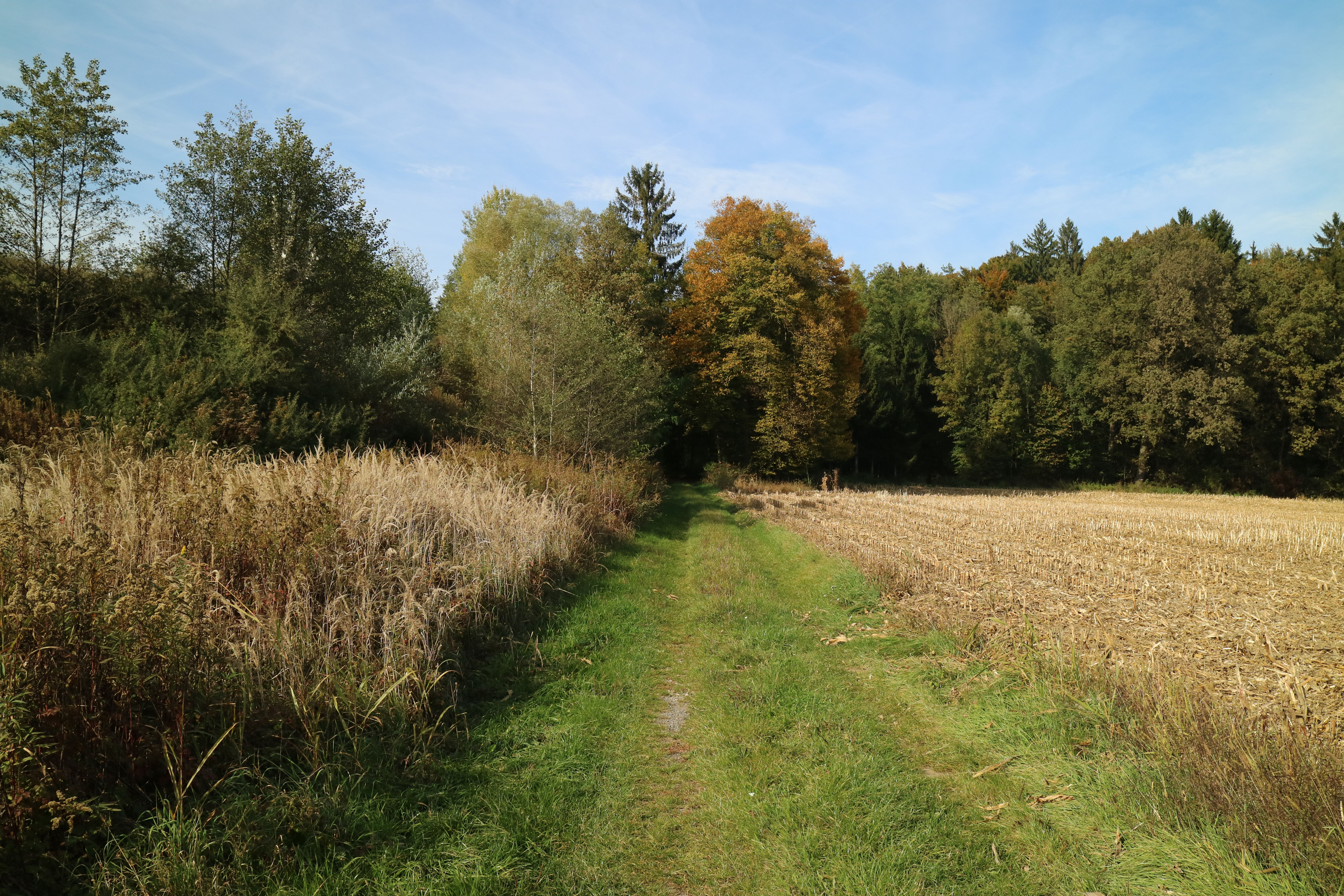 Kaiserwald bei Weitendorf (Gemeinde Wildon)